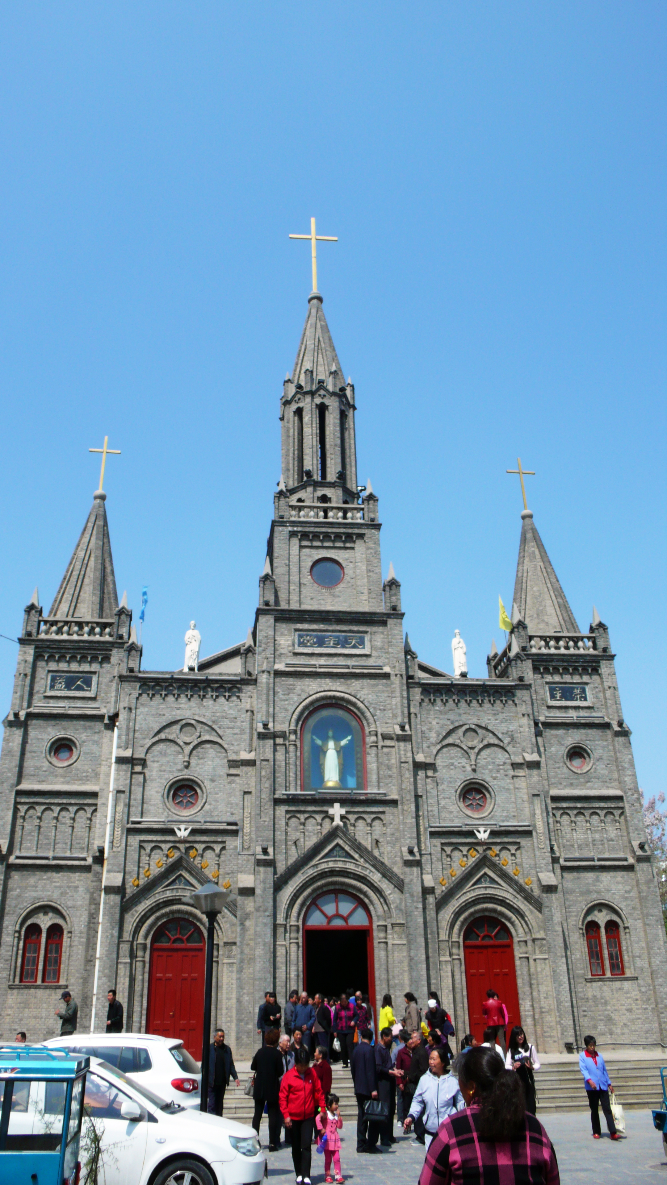 青州天主教堂，位于偶园街上。